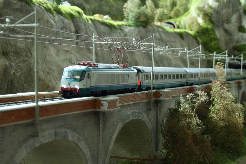 Un E402 impegna un ponte in un plastico in scala H0